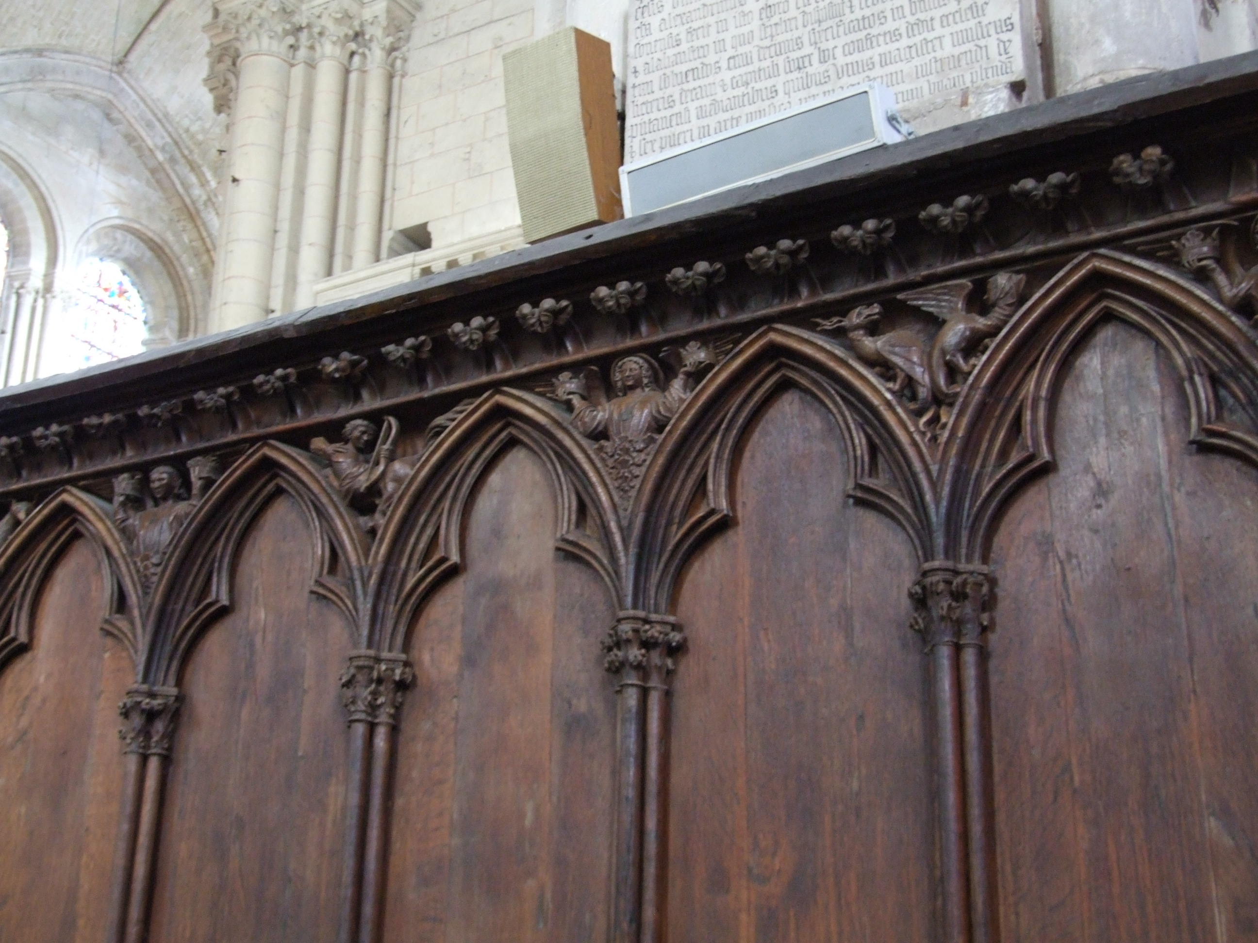 Cathédrale Saint-Pierre de Poitiers, Poitiers, Poitou-Charentes, FRANCE